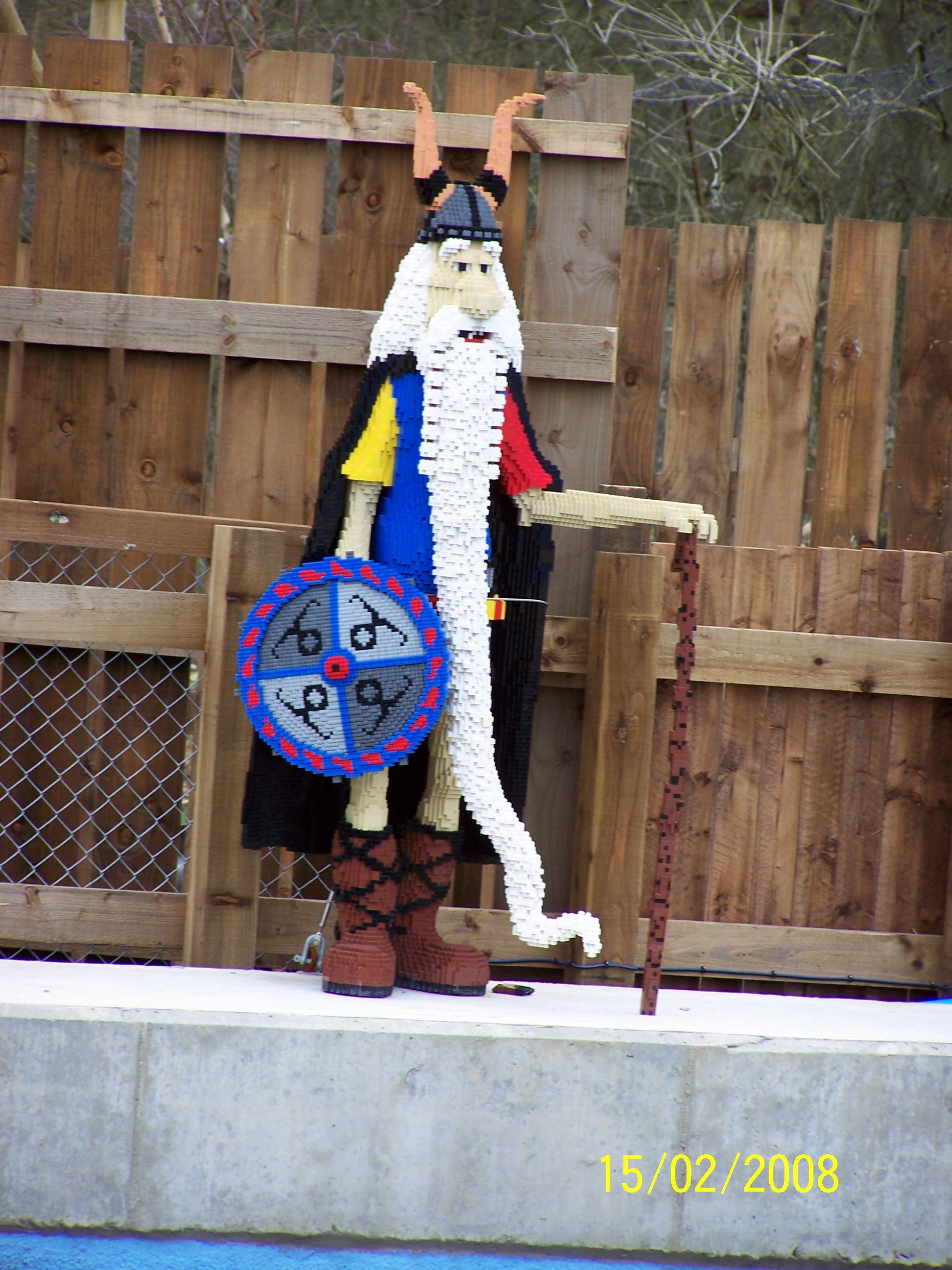 LEGOLAND Windsor, Berkshire, Inglaterra: personagem no brinquedo "Vikings River Splash"